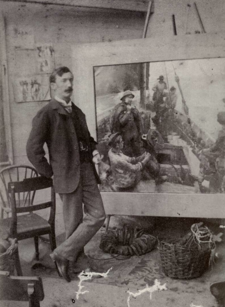 Painter Stanhope Forbes (1857-1947)